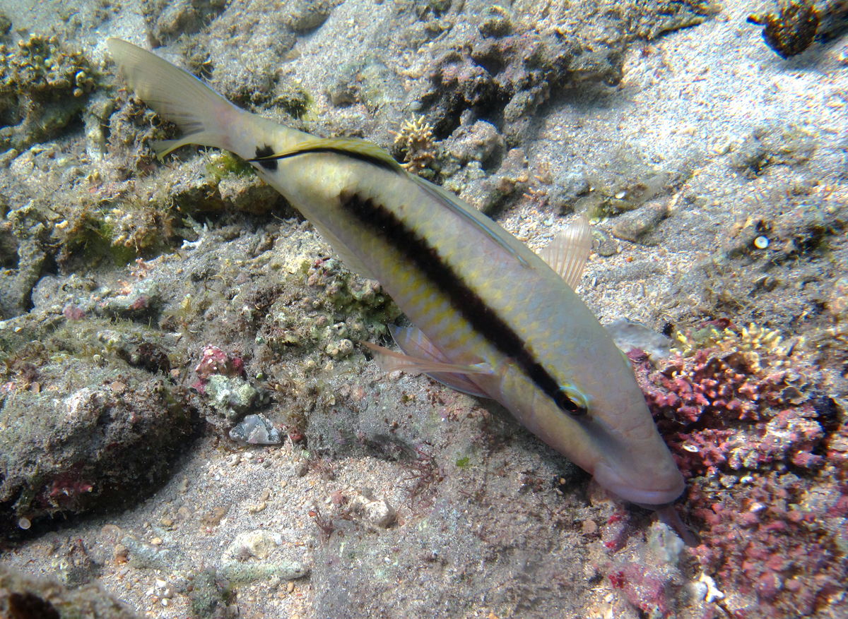 Un rouget à longue barbe (Parupeneus macronemus) à la Réunion.